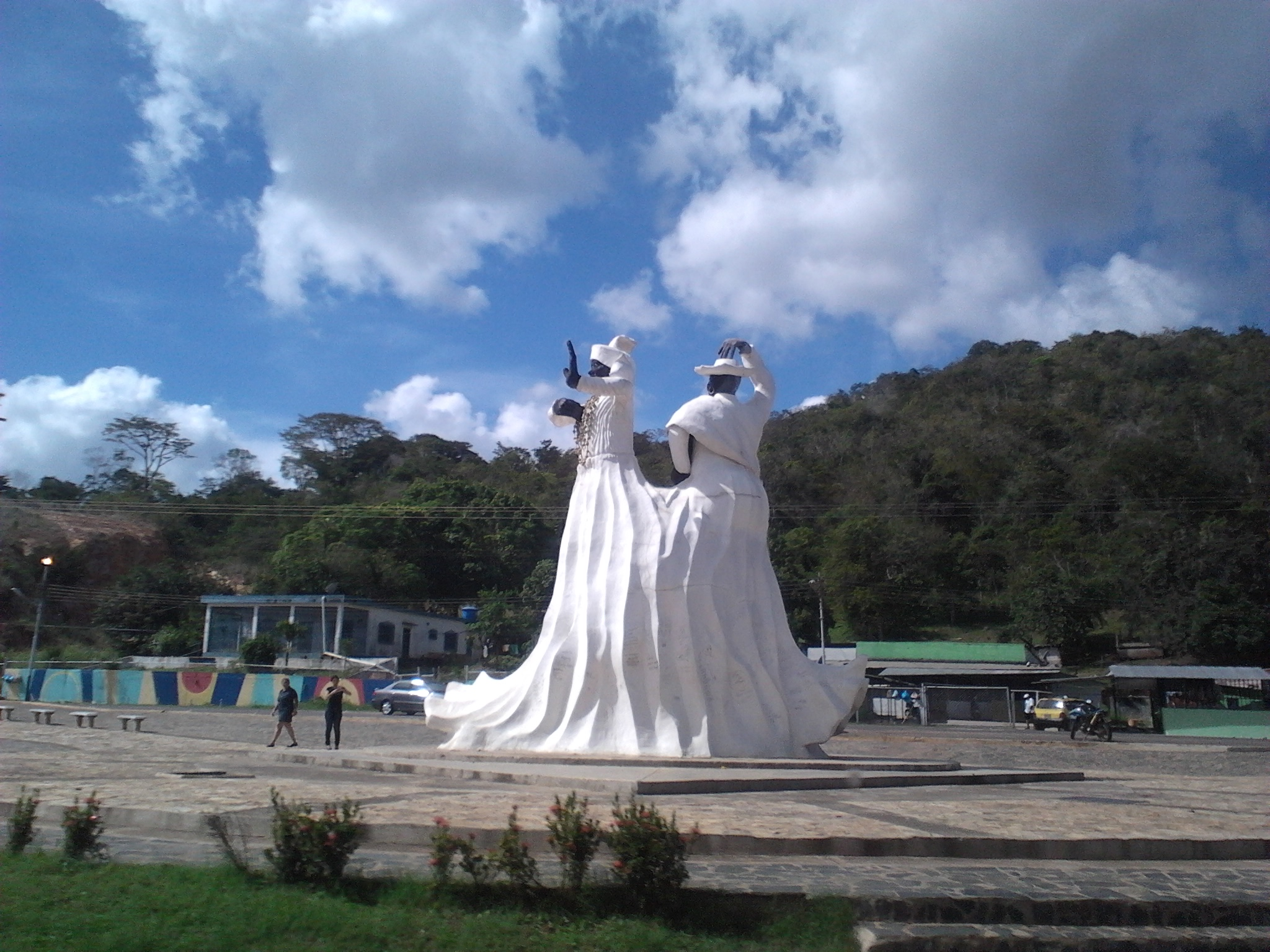 Estatua de las gran impulsoras del Calipso.